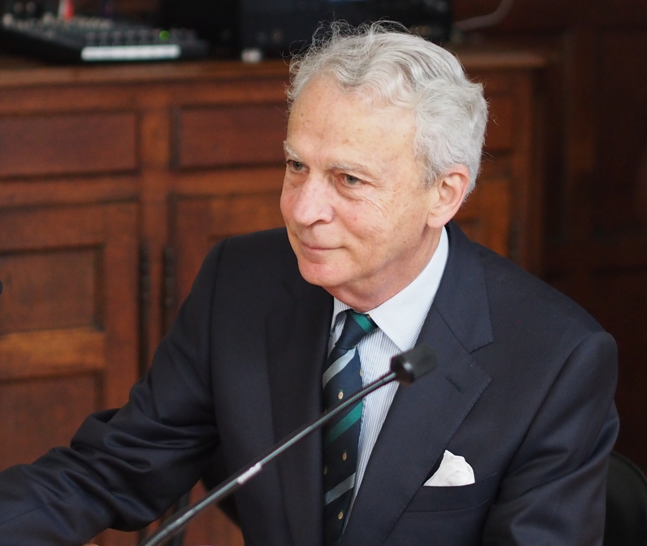 Brian Stock, lors d'une conférence / conversation avec Carlo Ossola, à Reid Hall (Paris, France), le 6 juin 2013.